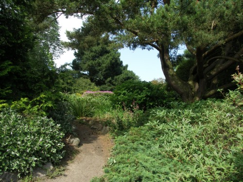 Cruickshank Botanic Garden, Aberdeen Category:Aberdeen